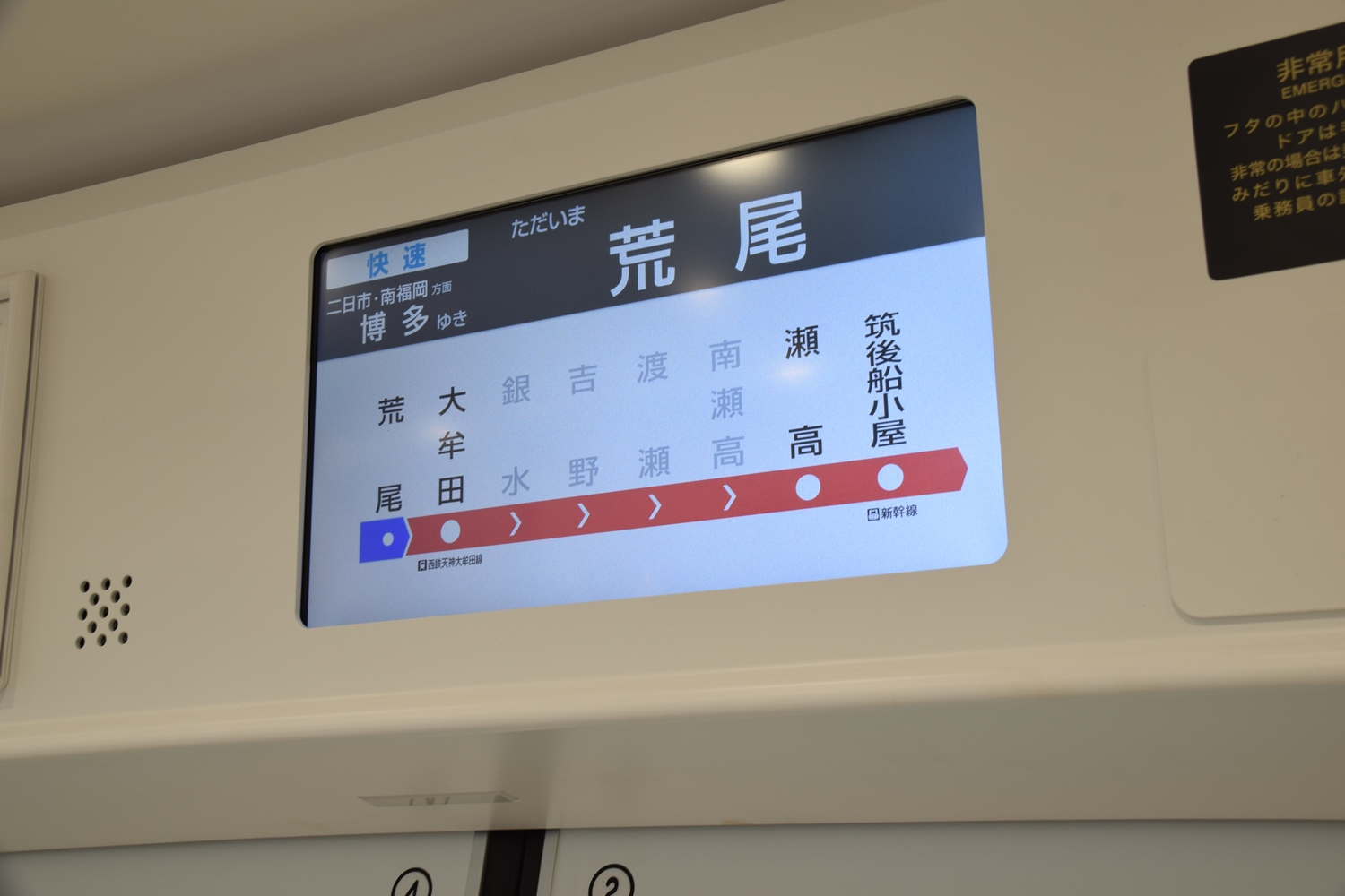 2019年3月16日荒尾駅にて撮影